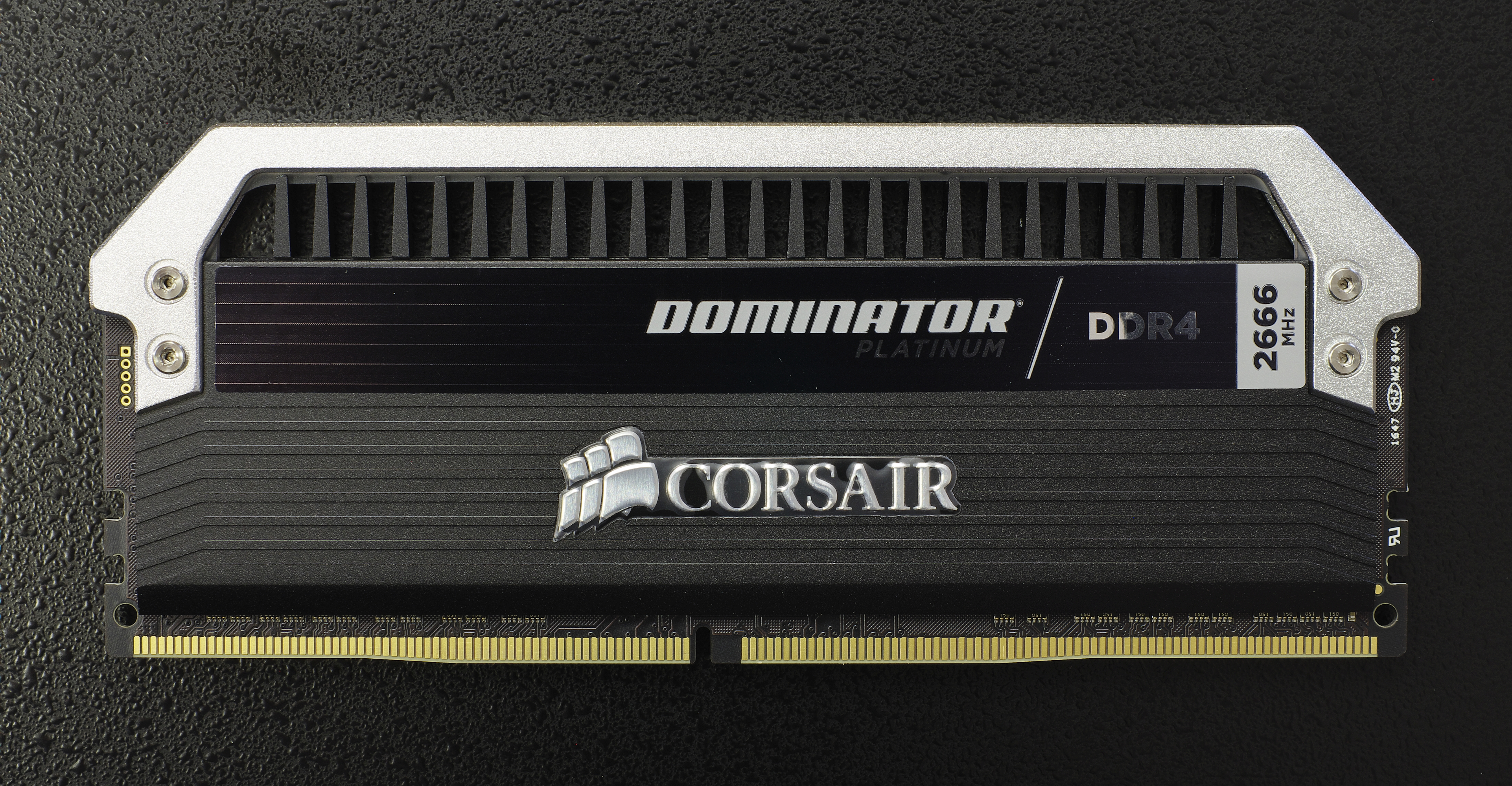 Corsair Dominator Platinum, DDR4 Ram 8 GB 2666 MHz 15-17-17-35 1.2V. Wird als 32-GB-Kit, bestehend aus vier Riegeln verkauft. Diese Speicherriegel sind mit massiven Kühlkörpern sowie LED-Beleuchtung ausgestattet.